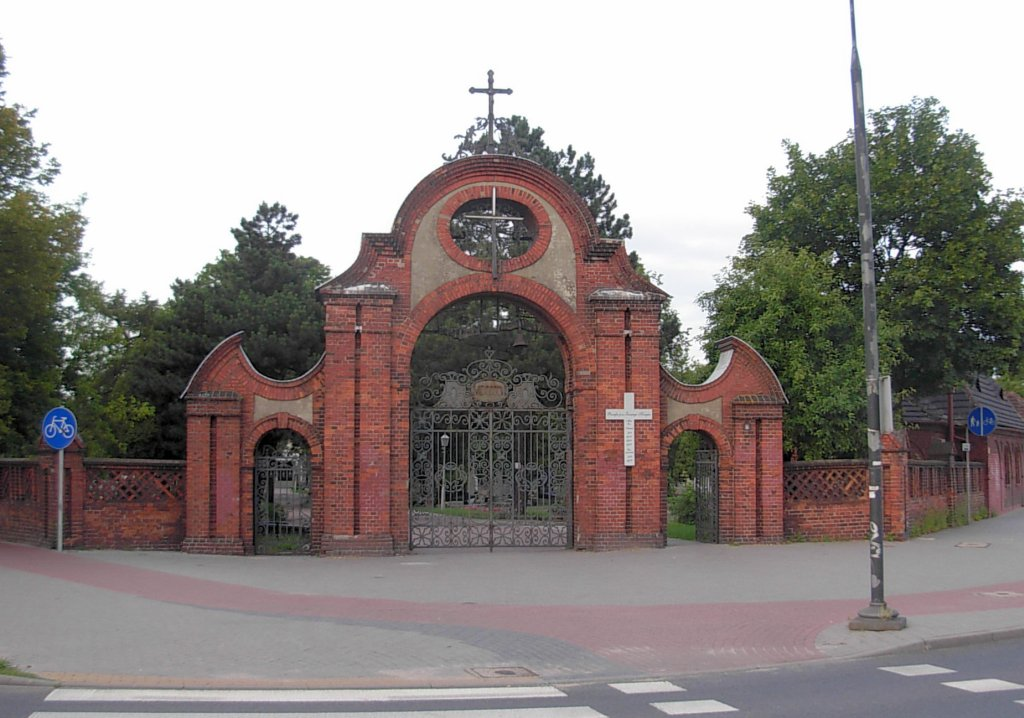 Cmentarz Nowofarny Bydgoszcz